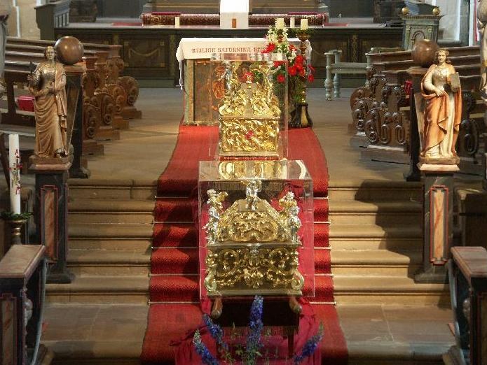 Zierschrein für die Reliquien der Hl. Saturnina (vorn) und der hl. Fortunata (hinten) während der Aussetzungszeit in der Stiftskirche St. Saturnina, Bad Driburg-Neuenheerse, Deutschland.